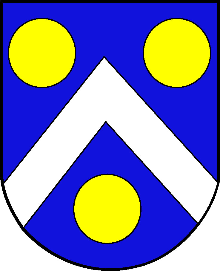 Blason de la commune de Villars-le-Terroir VD (CH)